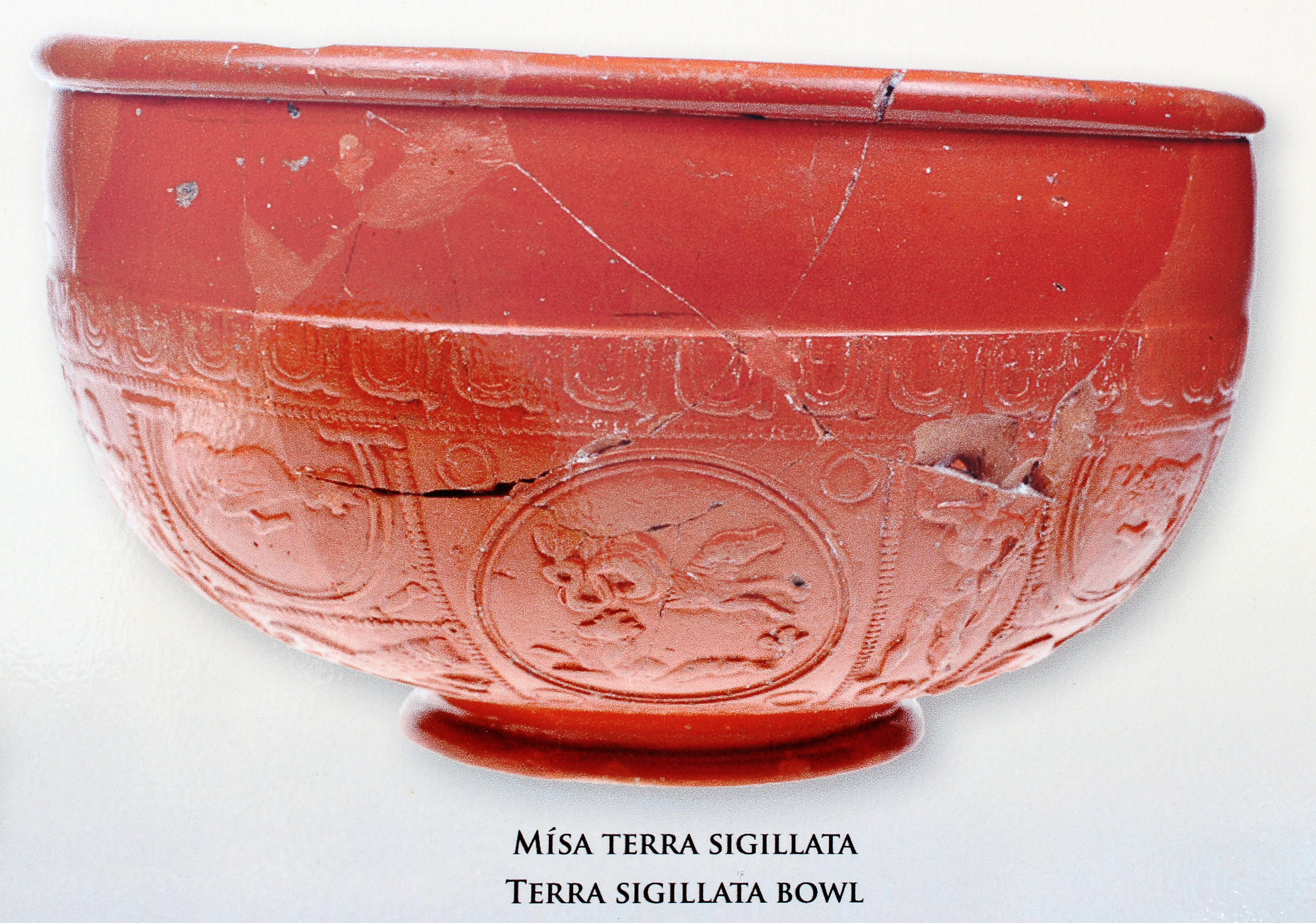 Mušov - Roman fortress - Excavated ceramic vase (175-180 AC) discovered by Czech academy of sciences team. Info board detail